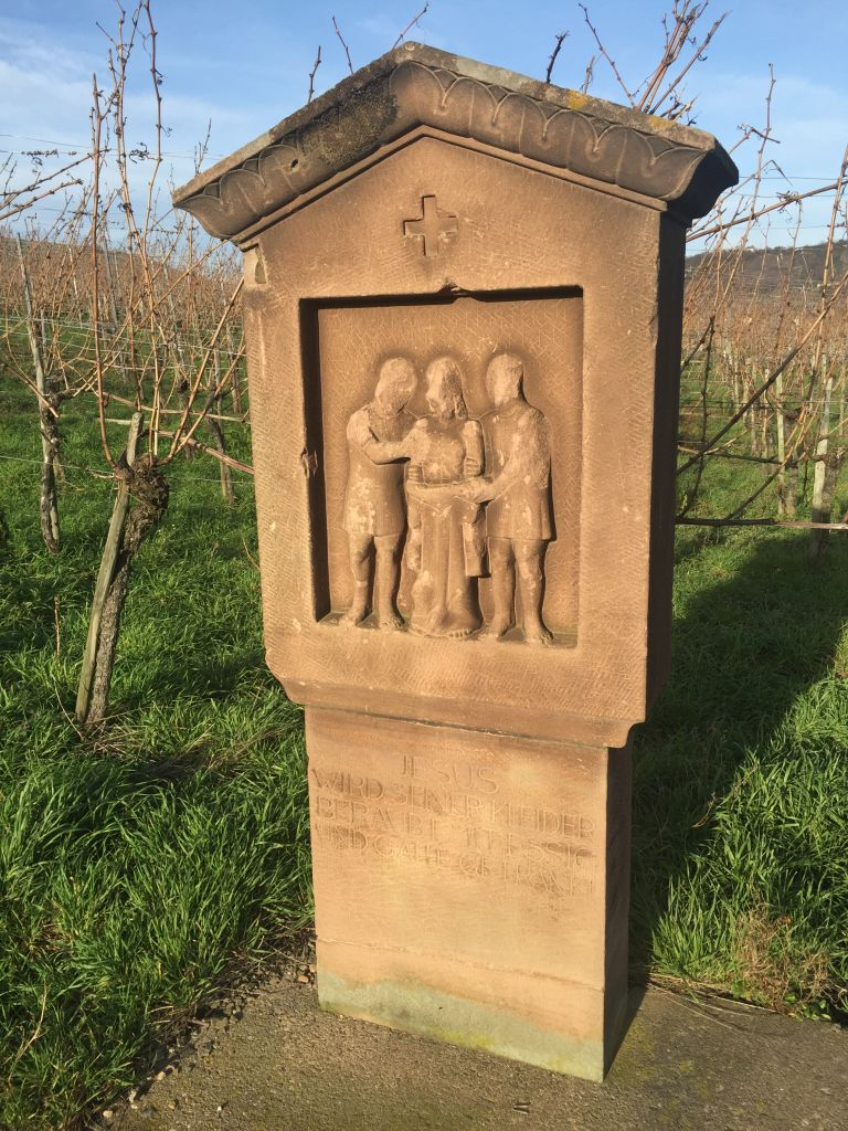 Kreuzweg Trittenheim - Station 10 von 14